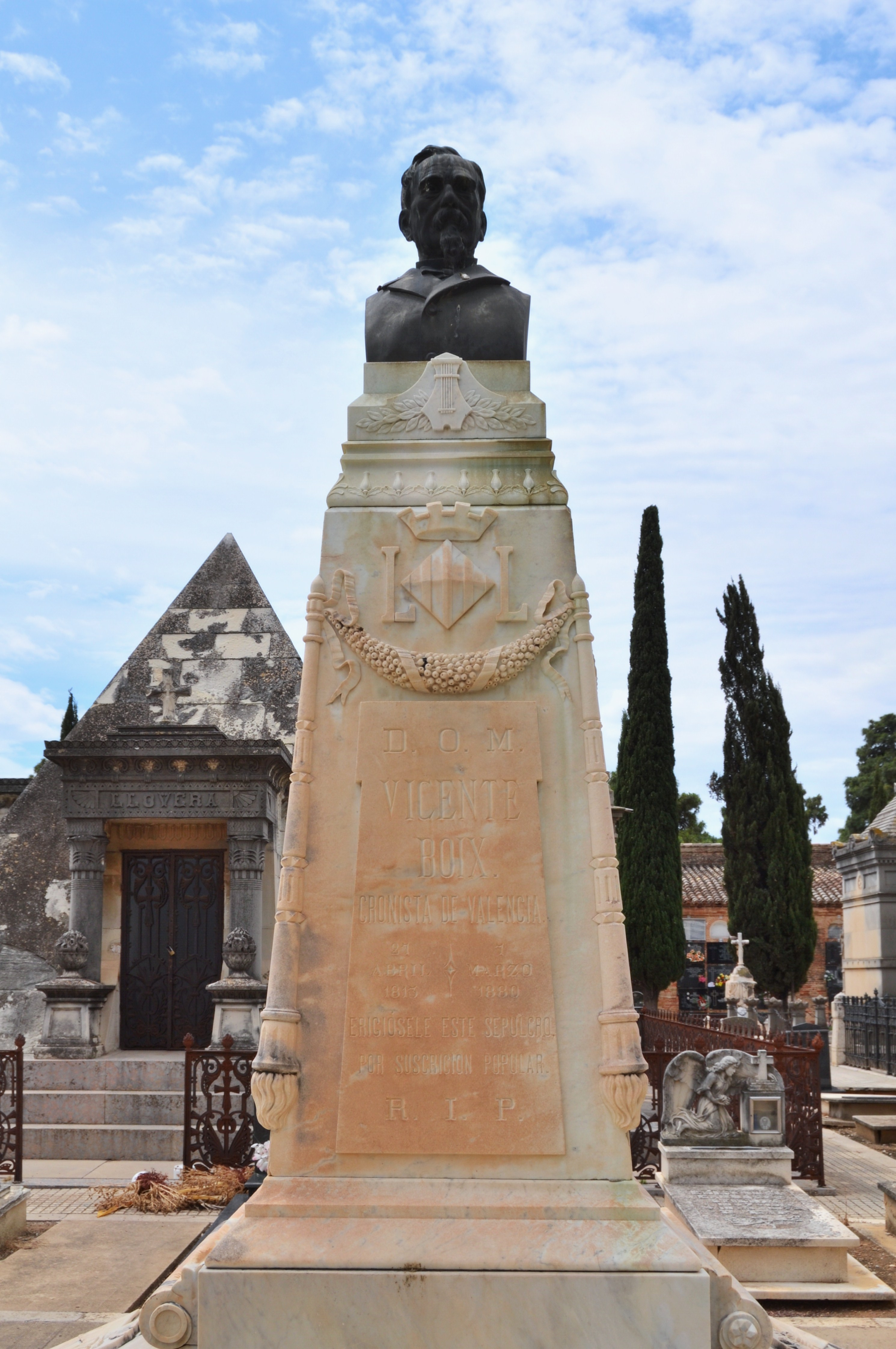 Tomba de Vicent Boix i Ricarte, cementeri general de València.